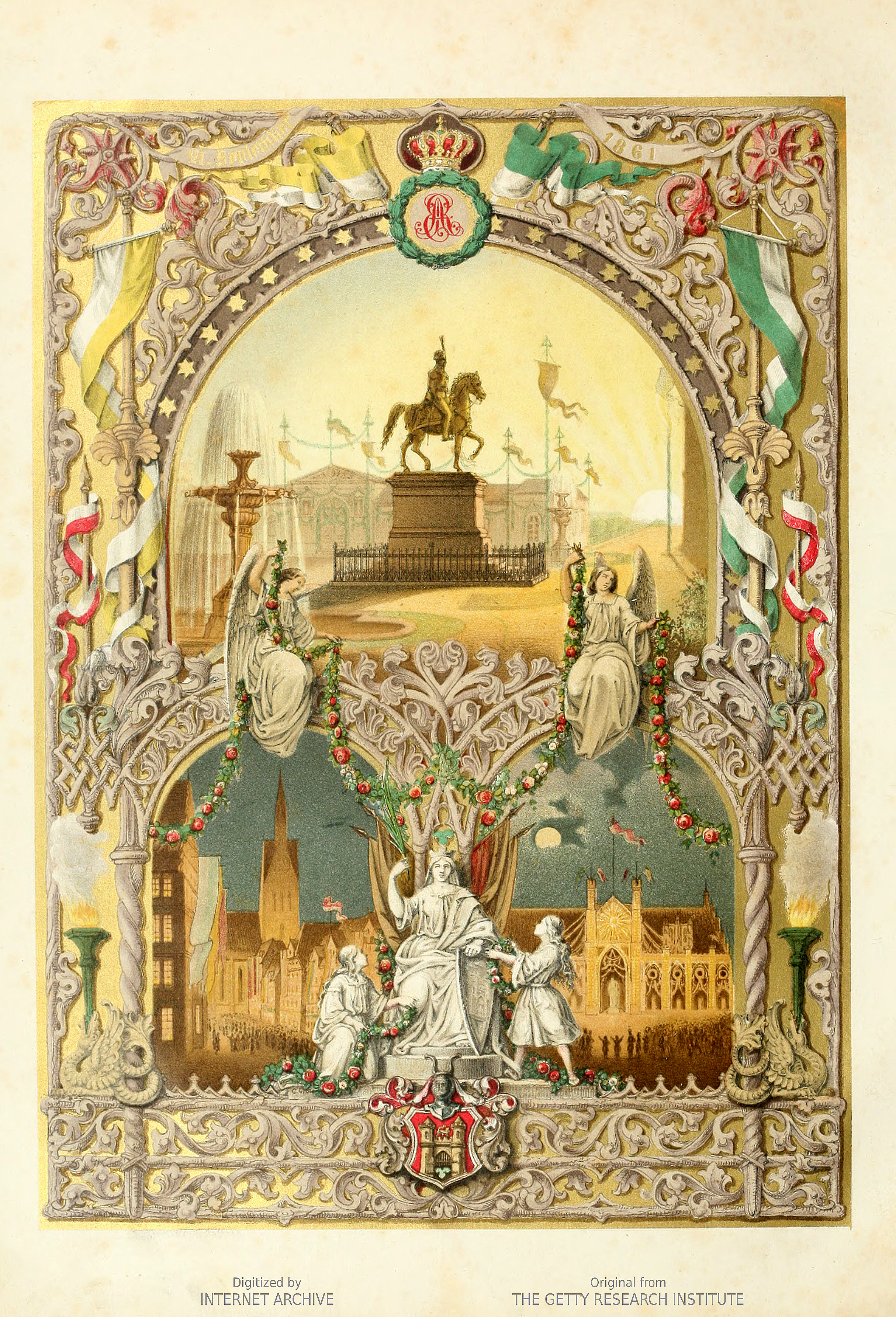 Seite aus dem Ernst August Album ...